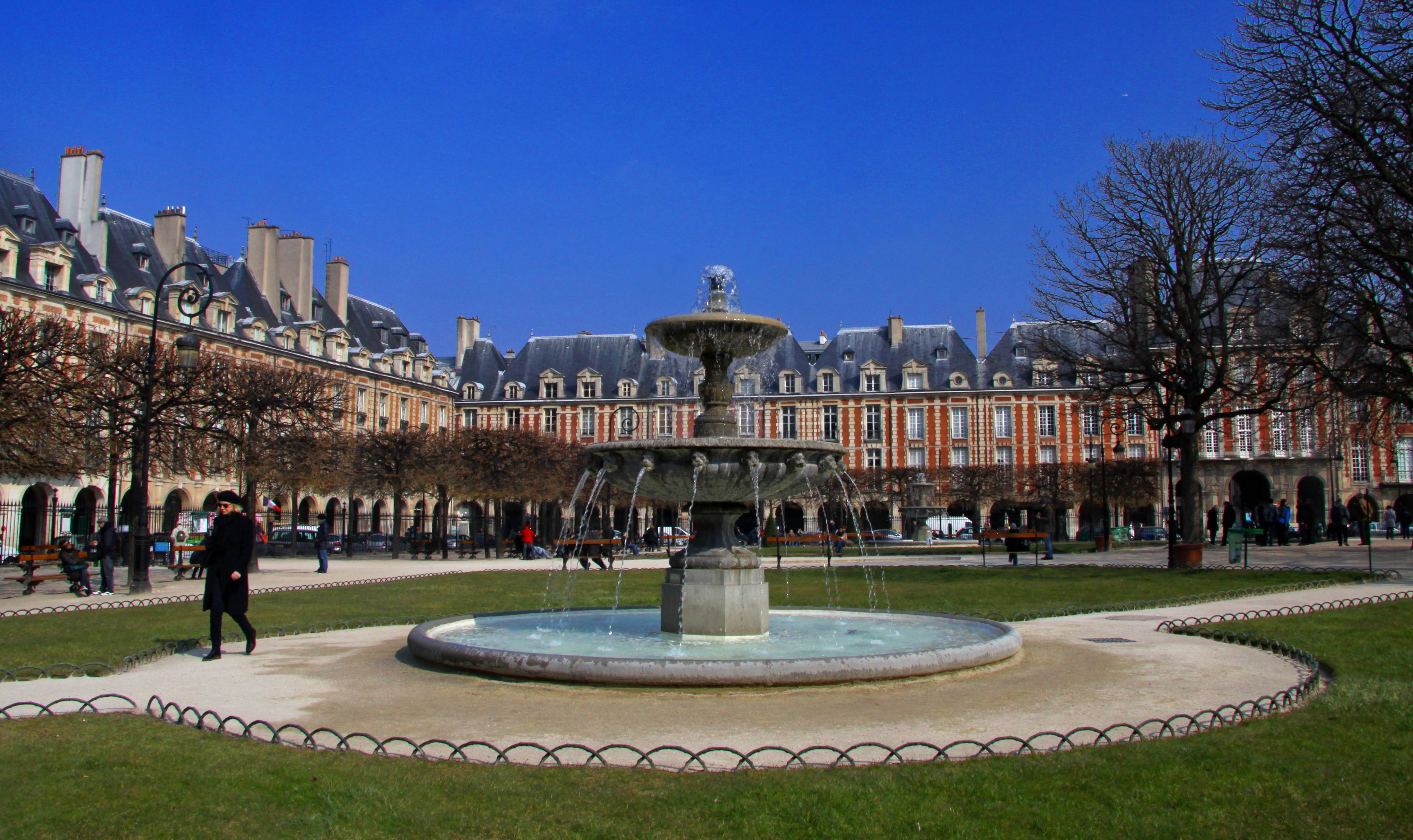 Place des Vosges, Paris.